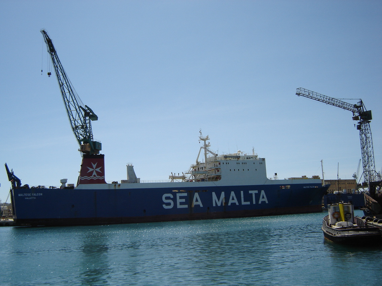 Boote und marine Anlagen, Zubehör und Details. Malta, April 2006. Roll-on Roll-off Schiff (RoRo-Schiff). Fotografin: Juliana da Costa José